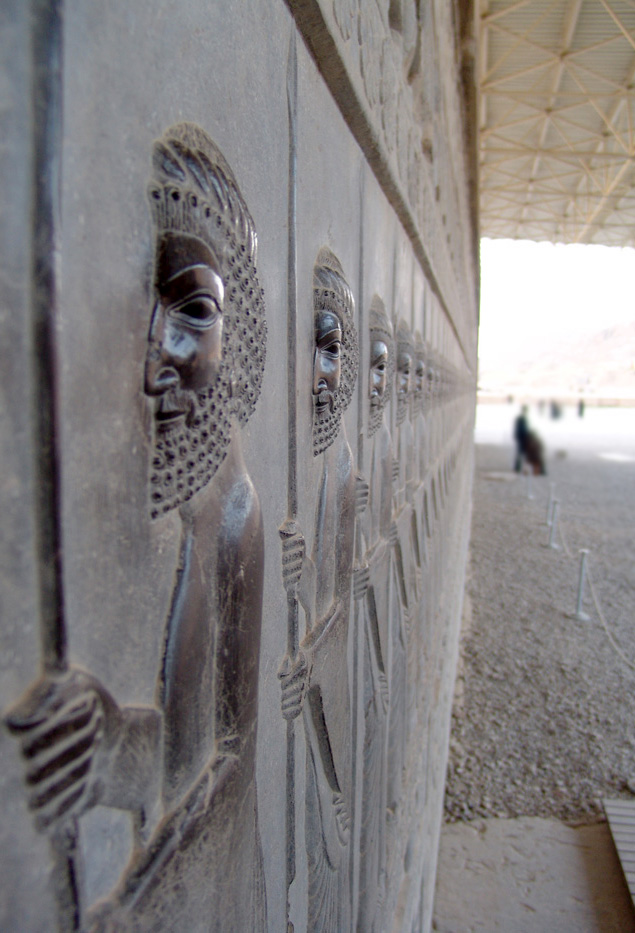 پلکان‌شرقی کاخ آپادانی تخت‌جمشید